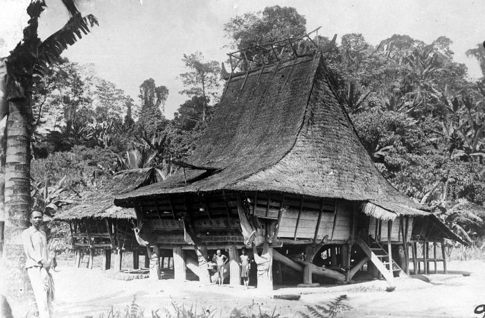 Repronegatief. Paalwoning op Nias